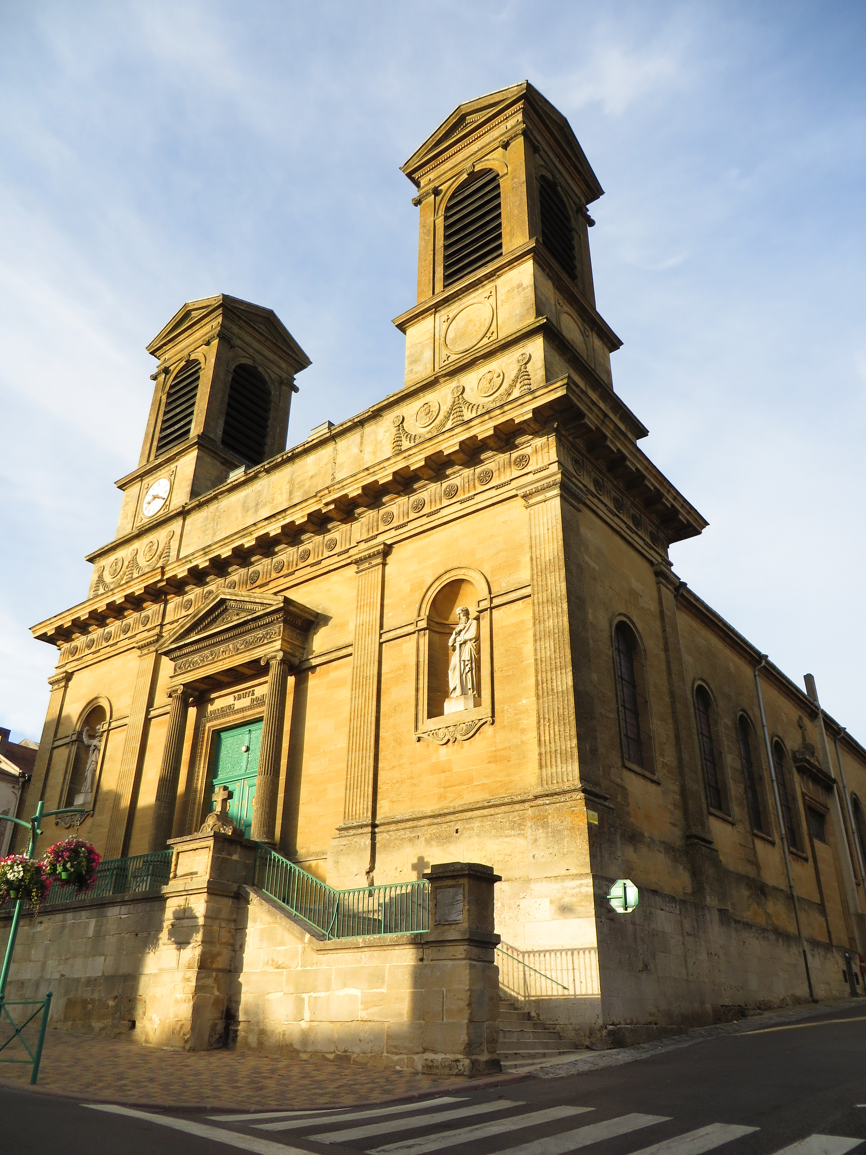 Stenay eglise